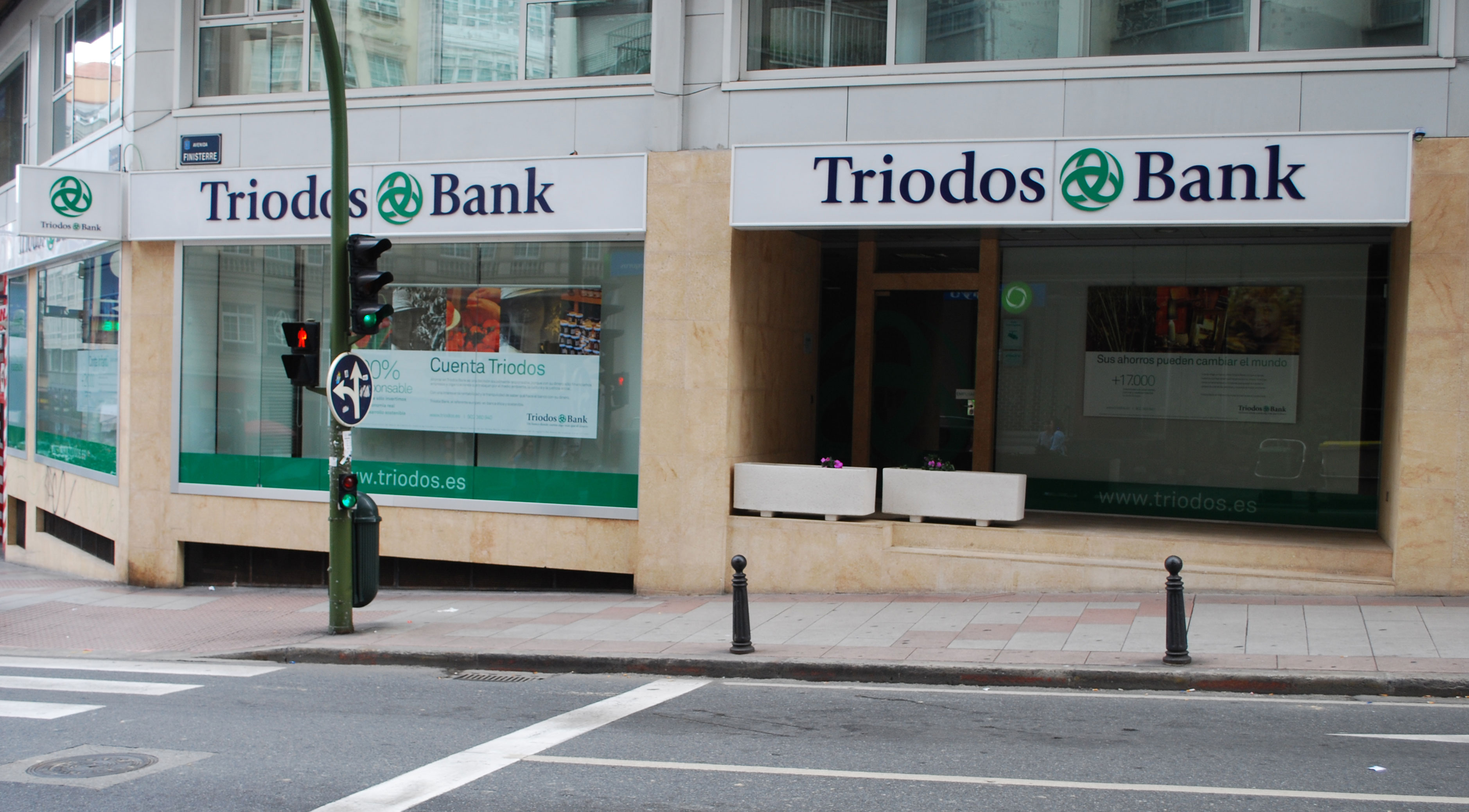 Oficina de Triodos Bank na coruña, avda. Finisterre Galiza